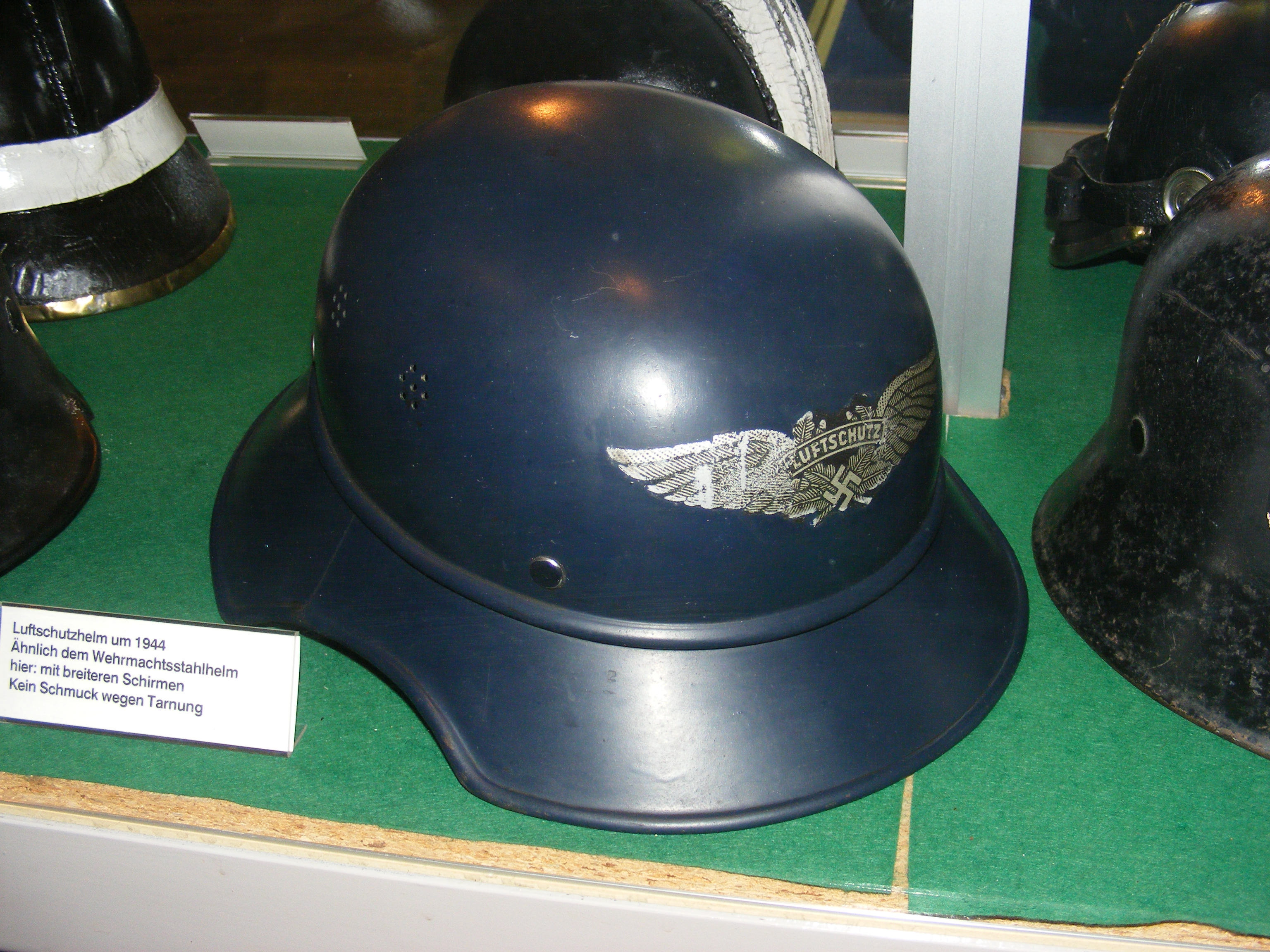 Fulda, Deutsches Feuerwehrmuseum — NS-Luftschutzhelm um 1944